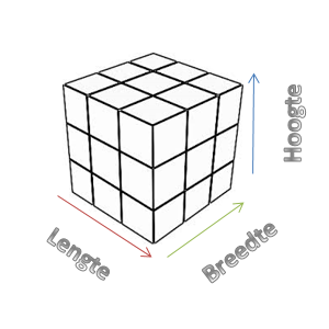 Voorbeeld van volume